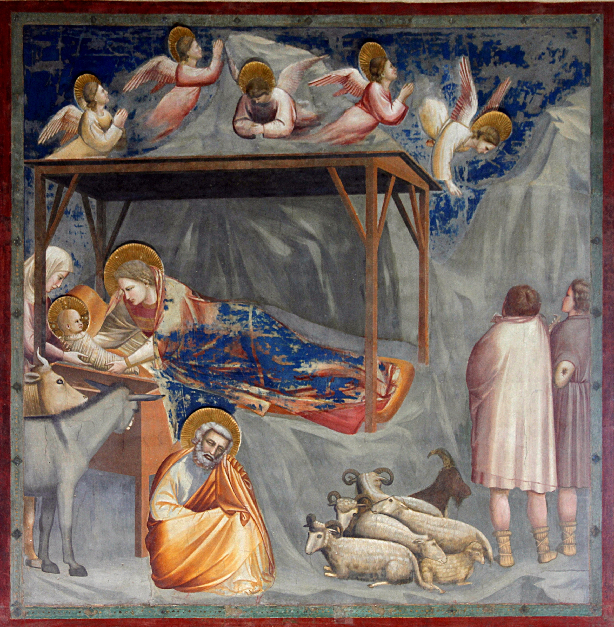 Capella dei Scrovegni - Padua